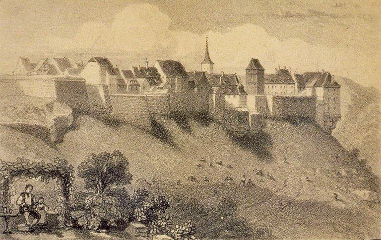 Le fort de la Petite-Pierre. Bibliothèque nationale et universitaire de Strasbourg